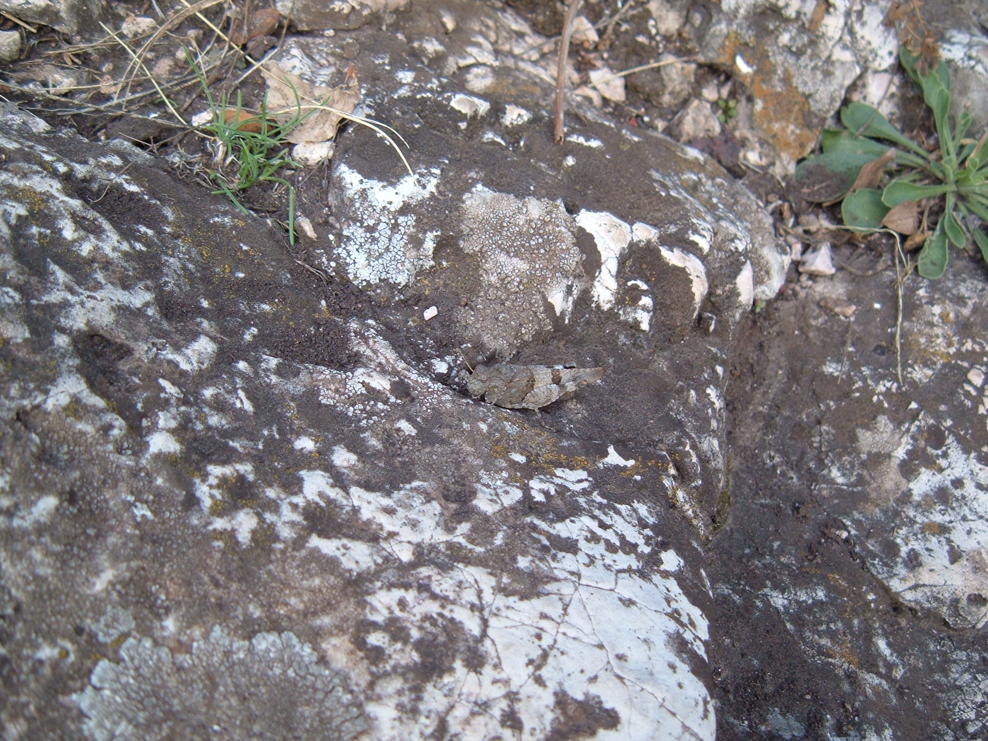 Mimikri esete zuzmóval és szöcskével (Budapest, Kecske-hegy)